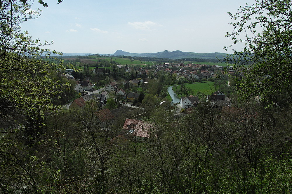 Bildbeschreibung: Aach aus Richtung Alter Turm Fotograf/Zeichner: Peter Schmenger Datum: 1.5.2006